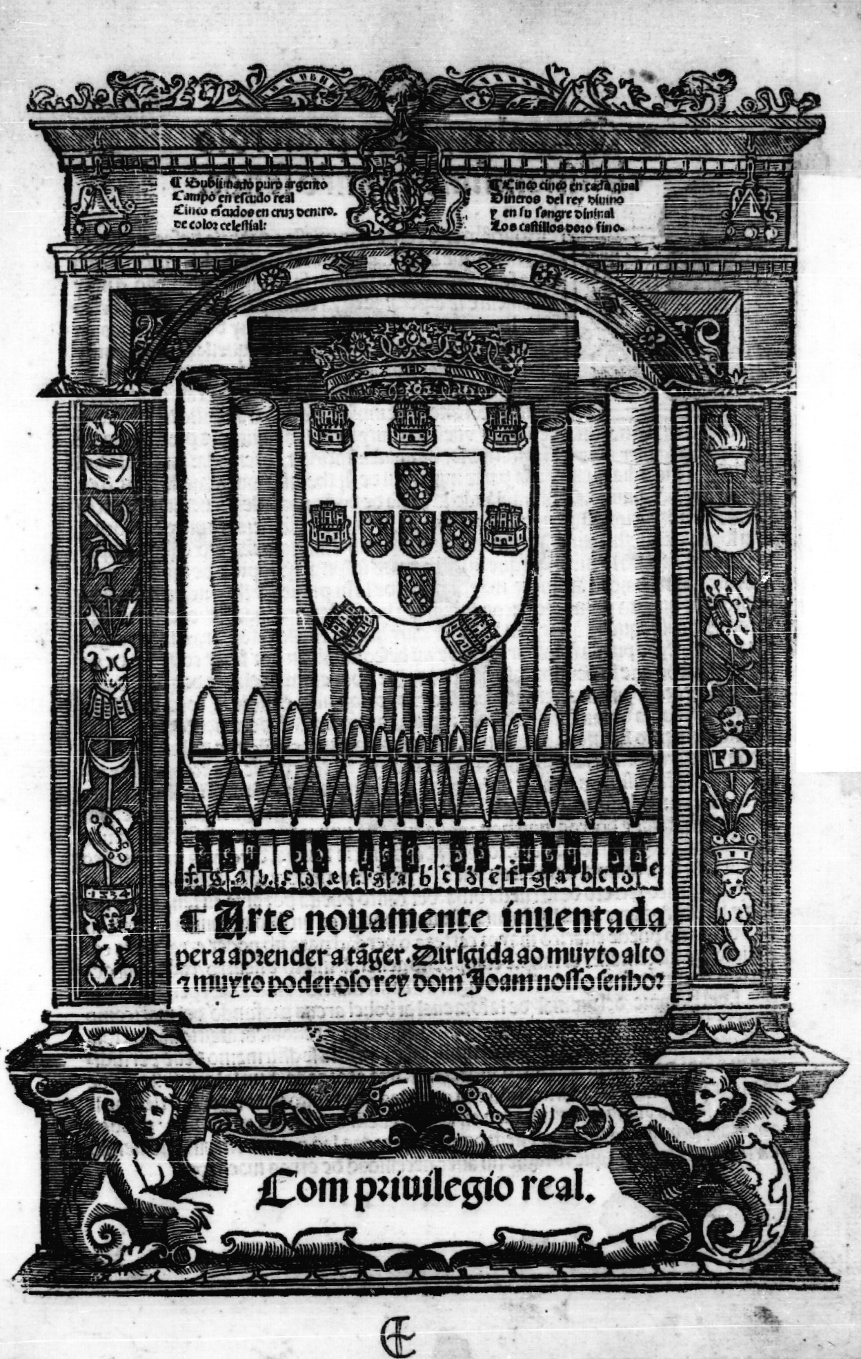 Frontispício de Arte nouamente inuentada pera aprender a tãger (Arte novamente inventada para aprender a tanger) de 1540 por Gonçalo de Baena.